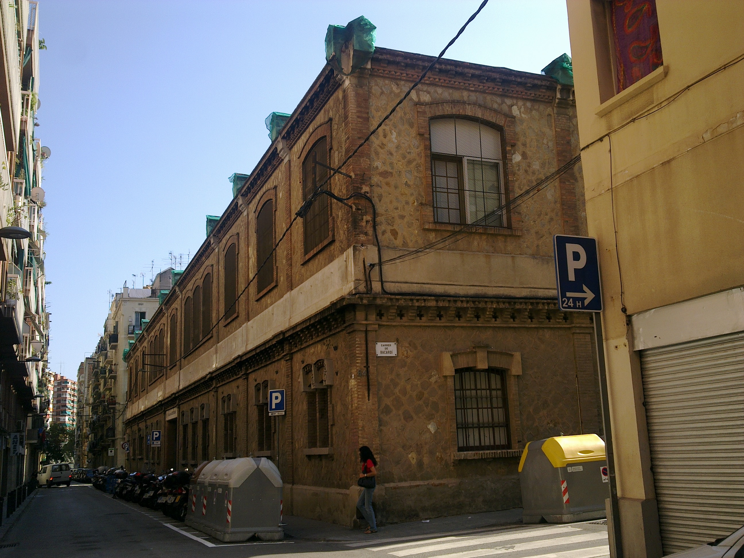 Barcelona